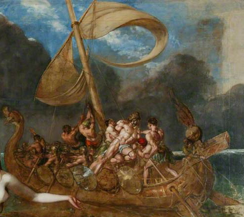 detail